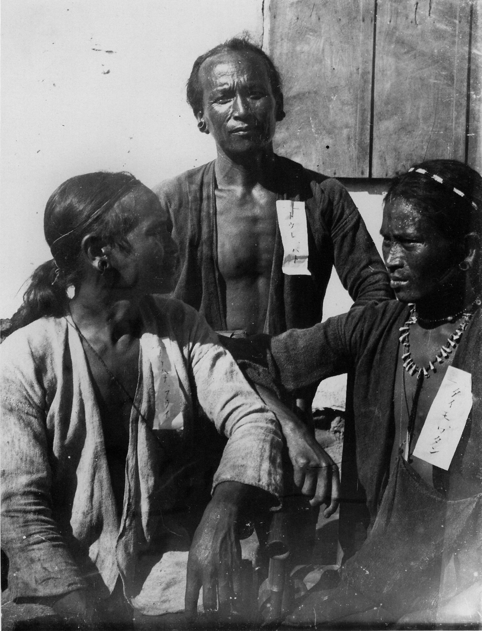 鳥居龍藏所攝眉原社泰雅族男人